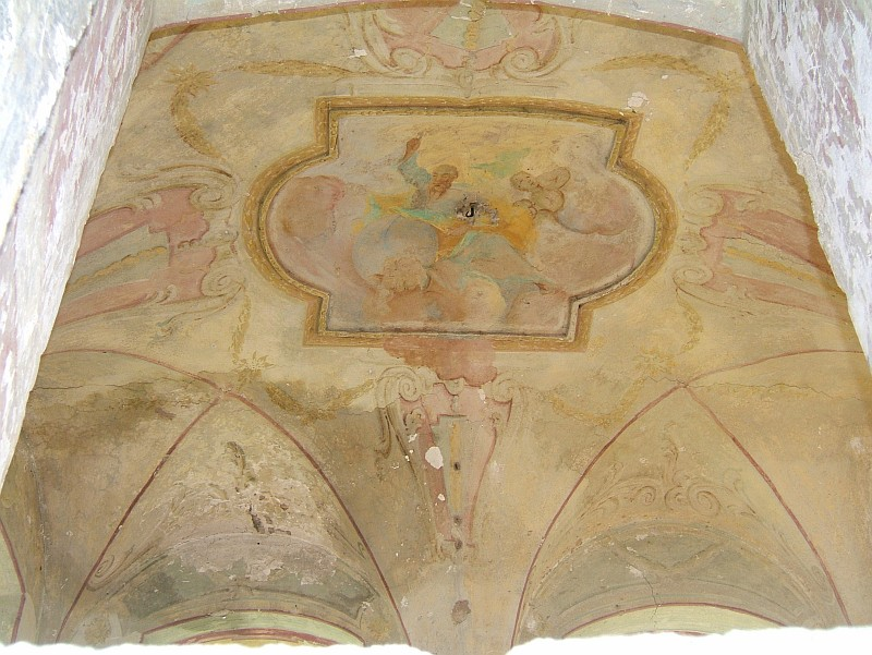 stropné fresky v kaštieli Dolná Mičiná